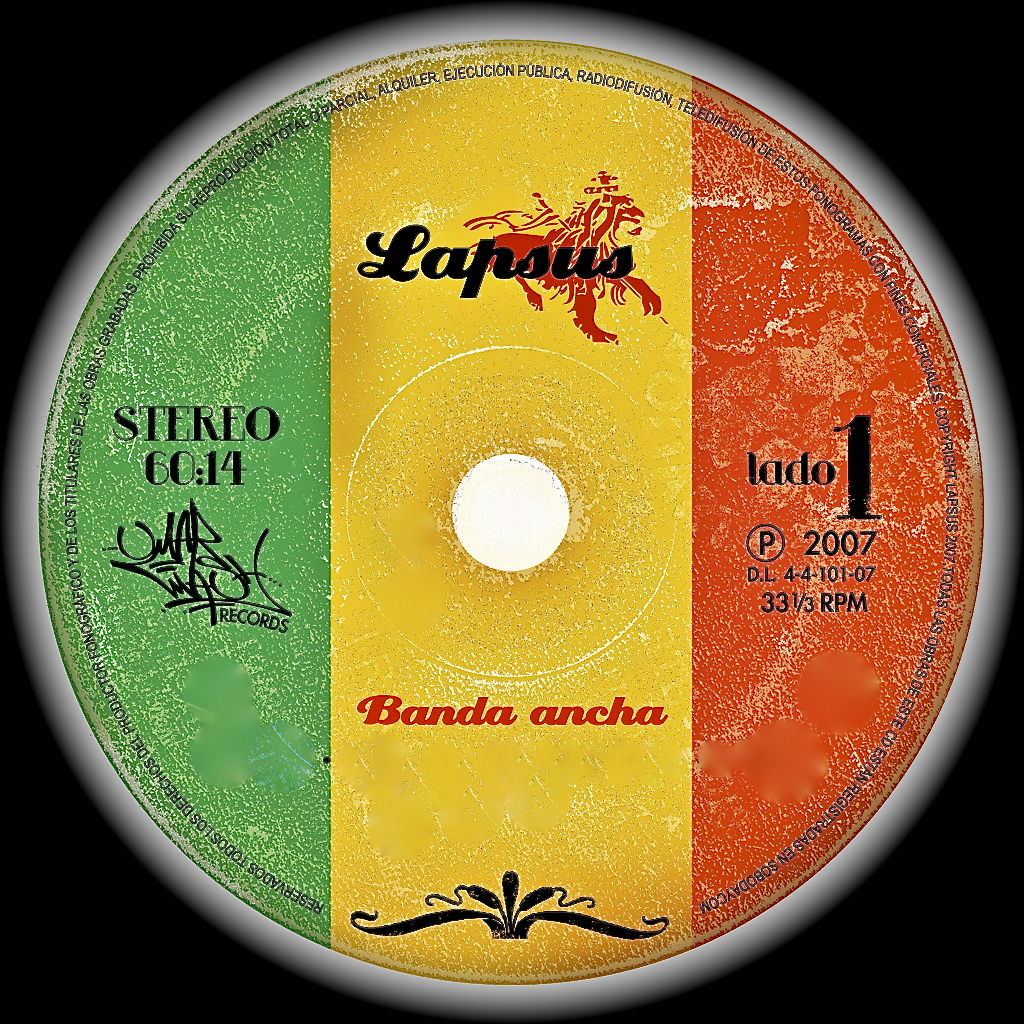 Galleta cd Lapsus Banda Ancha 2007